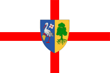 Orhei flag